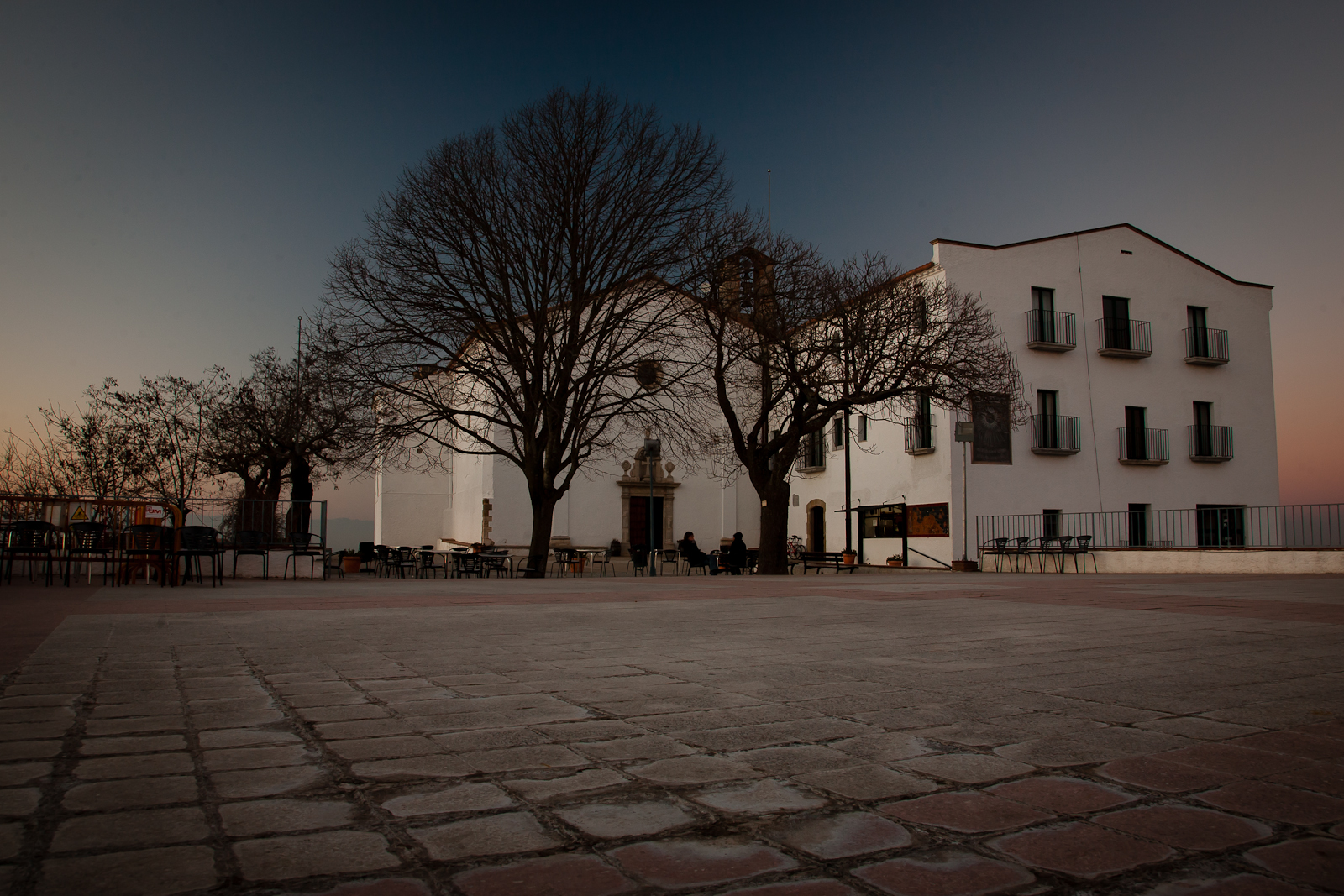 Vista del Santuari de la Mare de Déu dels Àngels a la posta de sol. Sant Martí Vell (Girona)